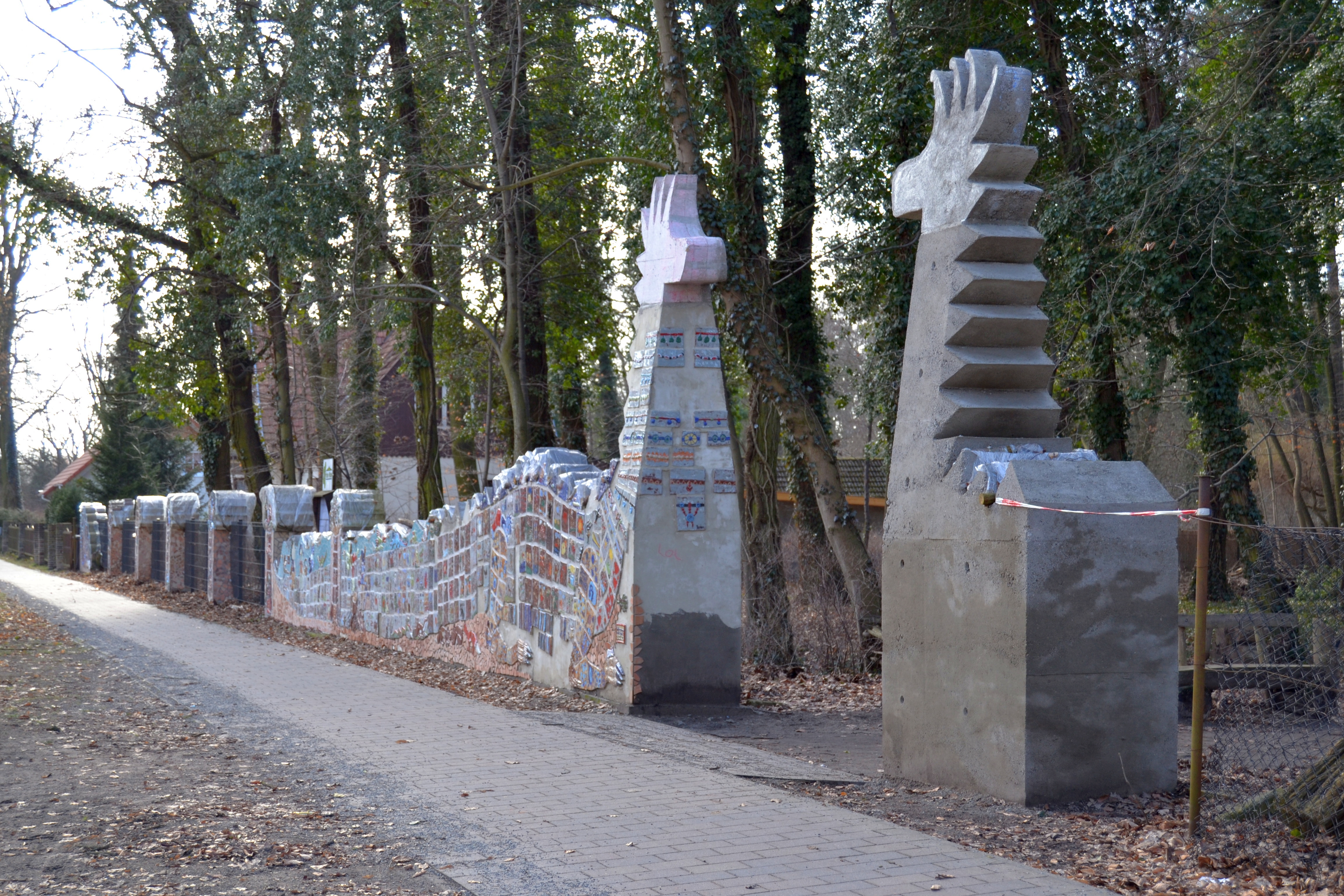 Eingang zum Kleinen Spreewaldpark in Schöneiche bei Berlin